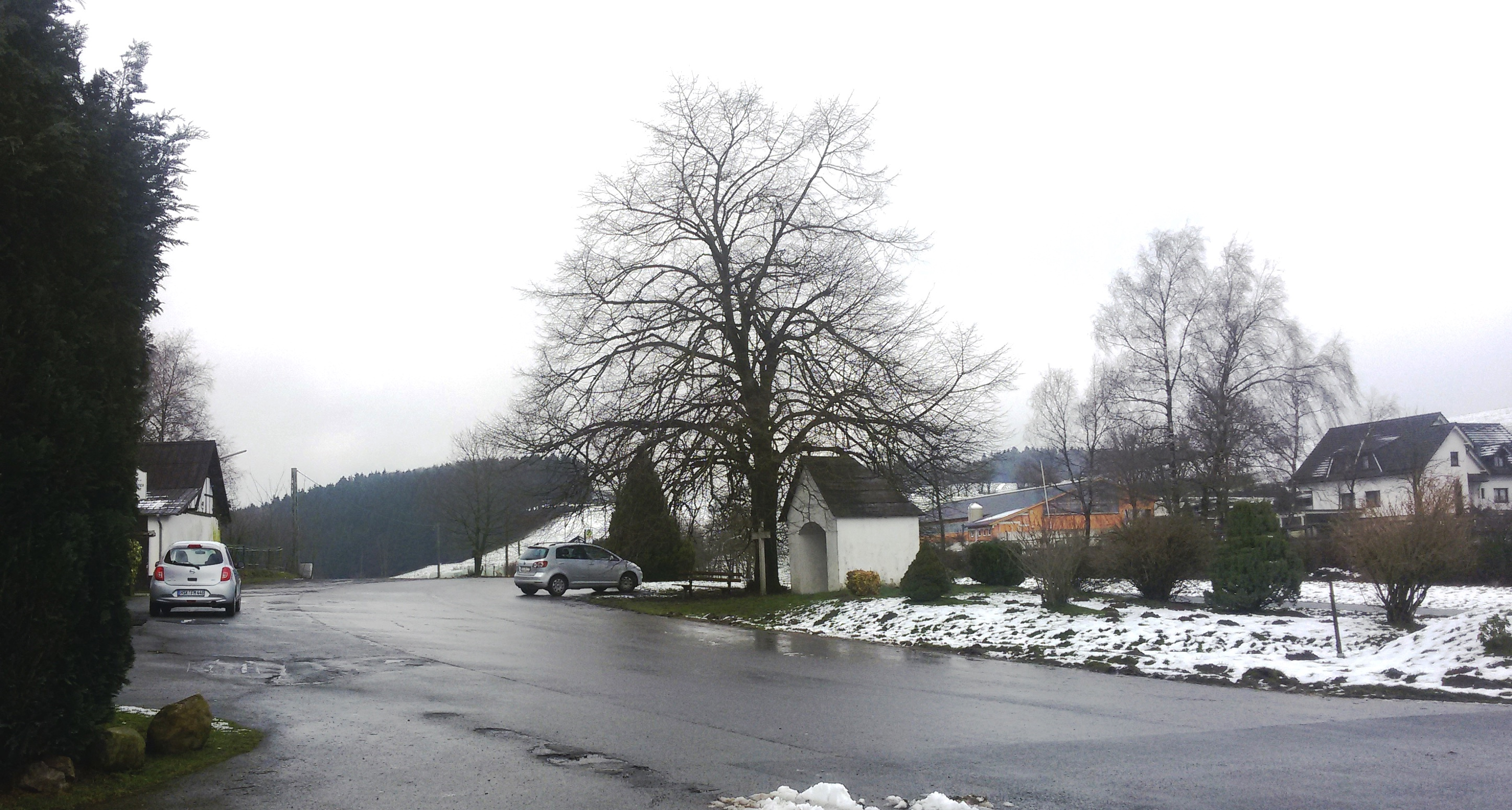 Auf der Schwartmecke (Eslohe) an der B 55, im Hintergrund Blick auf Reithalle